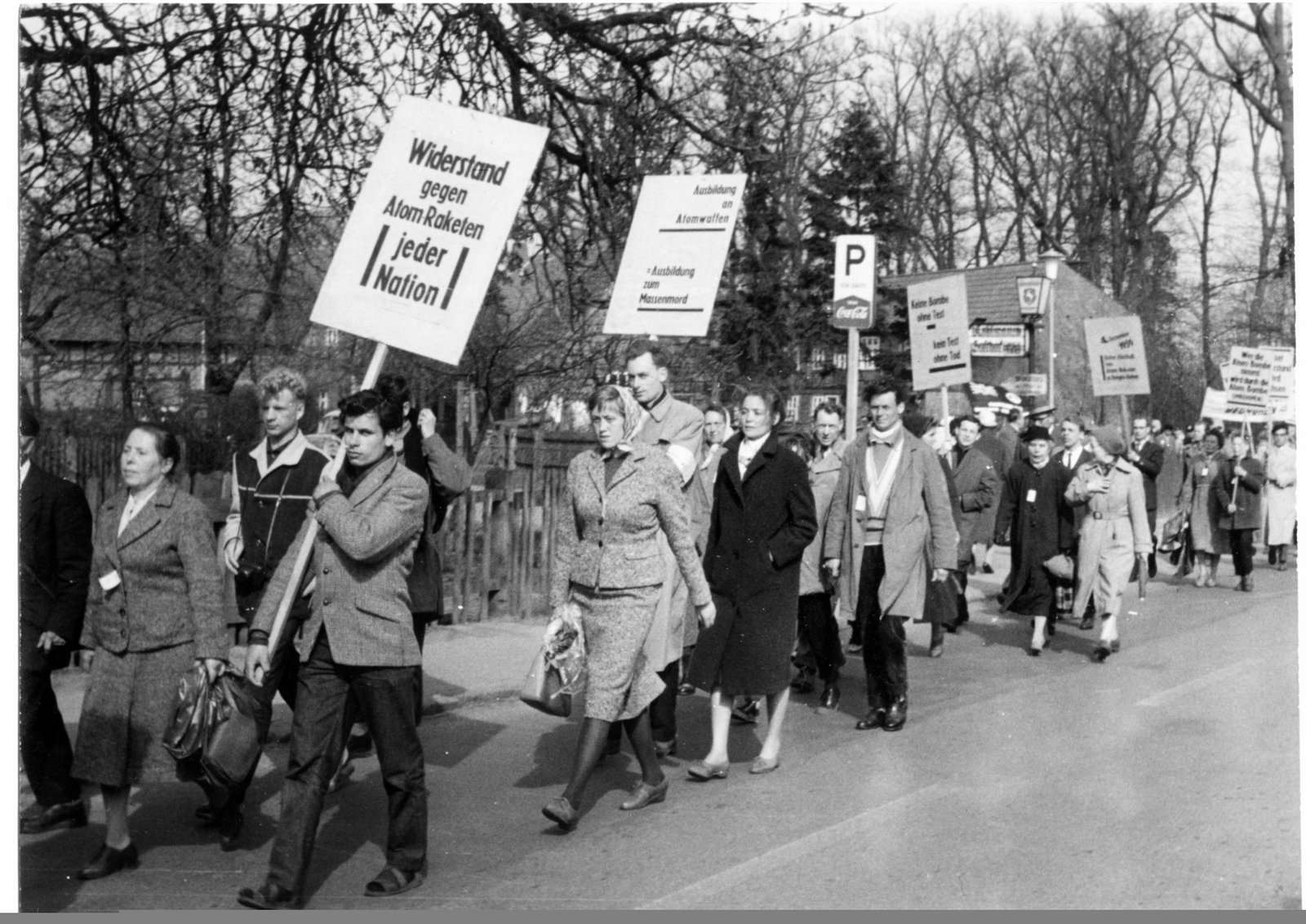 Ostermarsch 1960 von Hamburg nach Bergen-Hohne (die anderen Sternmarsch-Gruppen kamen von Bremen, Braunschweig und Hannover)